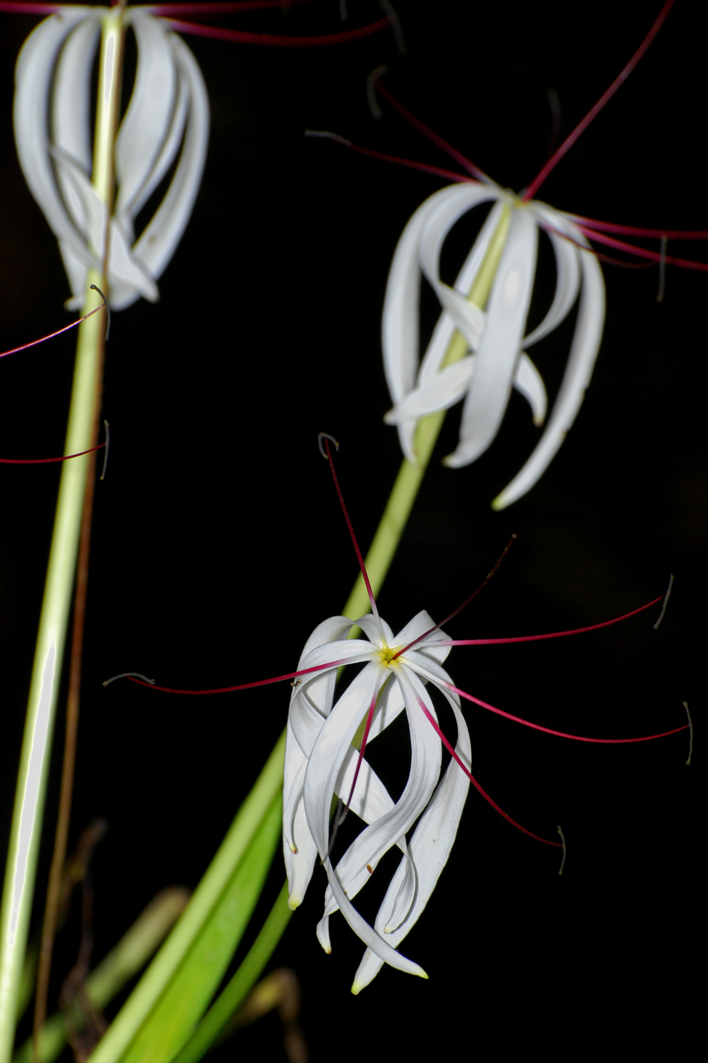 Amaryllidaceae Orellana province, Ecuadorian Amazon